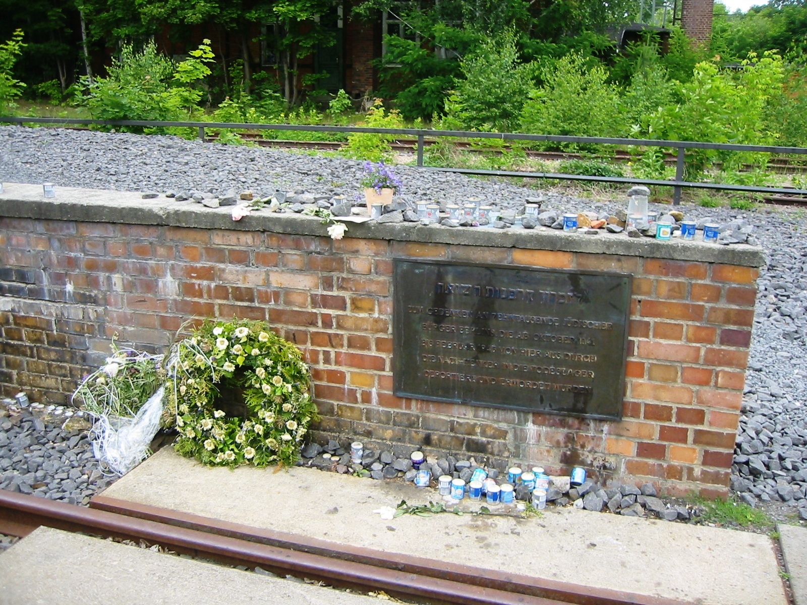 Messingplakette am Mahnmal Gleis 17 am Bahnhof Berlin-Grunewald